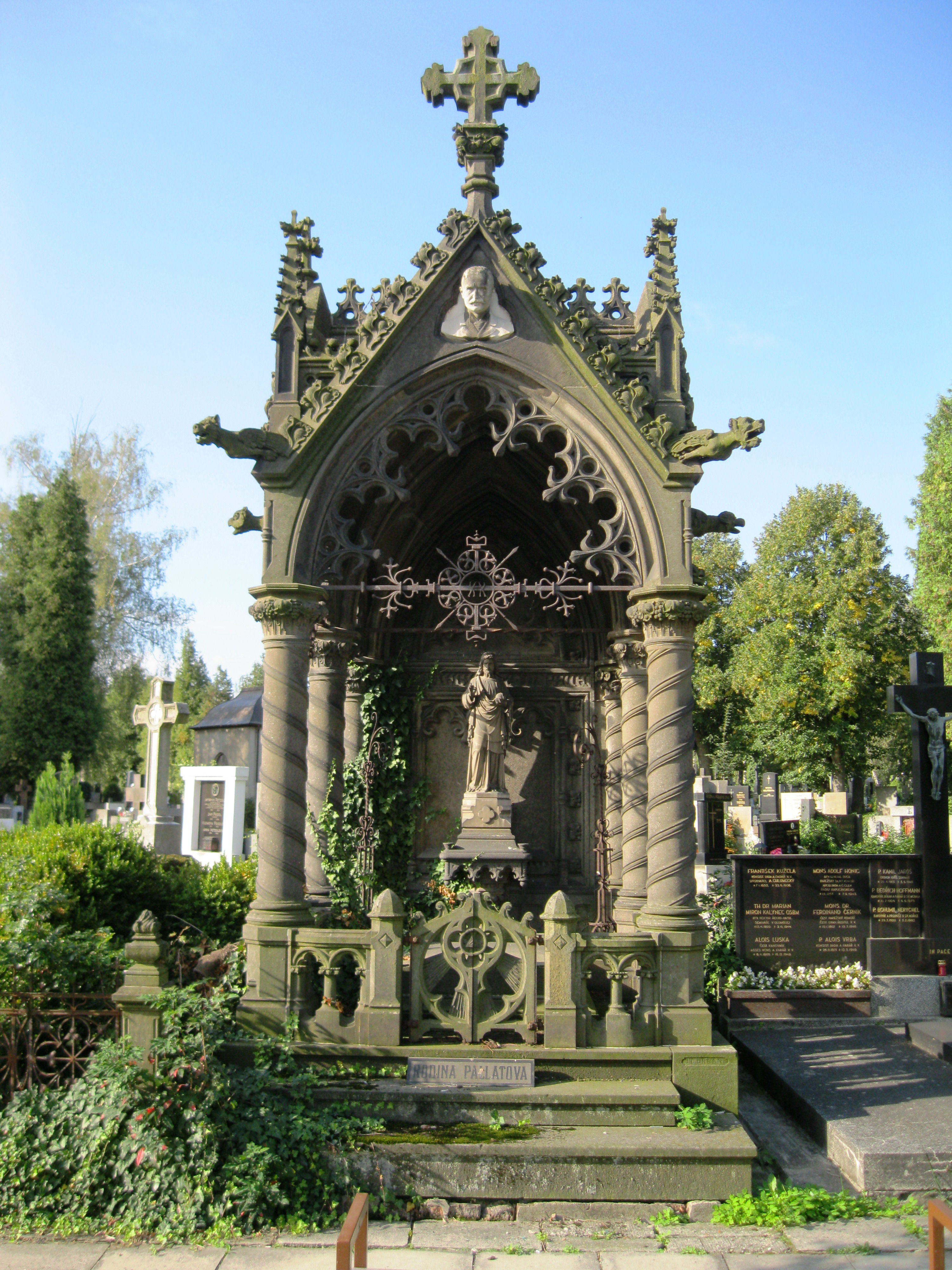 Jiná funerální stavba - soubor hřbitovní architektury, hrobky, hroby (Olomouc), ústřední hřbitov, tř. Míru, Olomouc